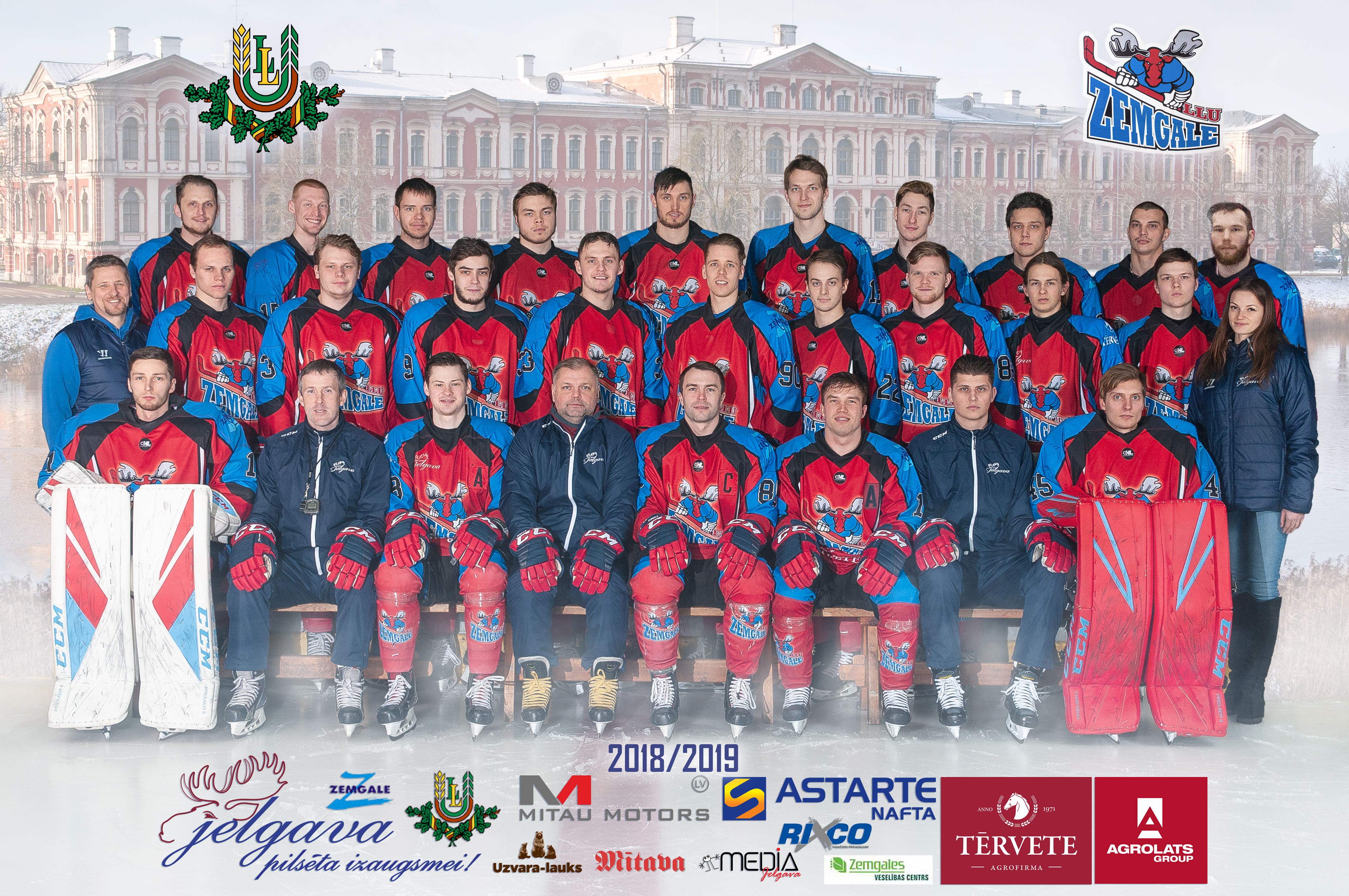 HK Zemgale/LLU spēlētāju, treneru un apkalpojošā personāla kopbilde pirms pusfināla izslēgšanas spēļu kārtas.